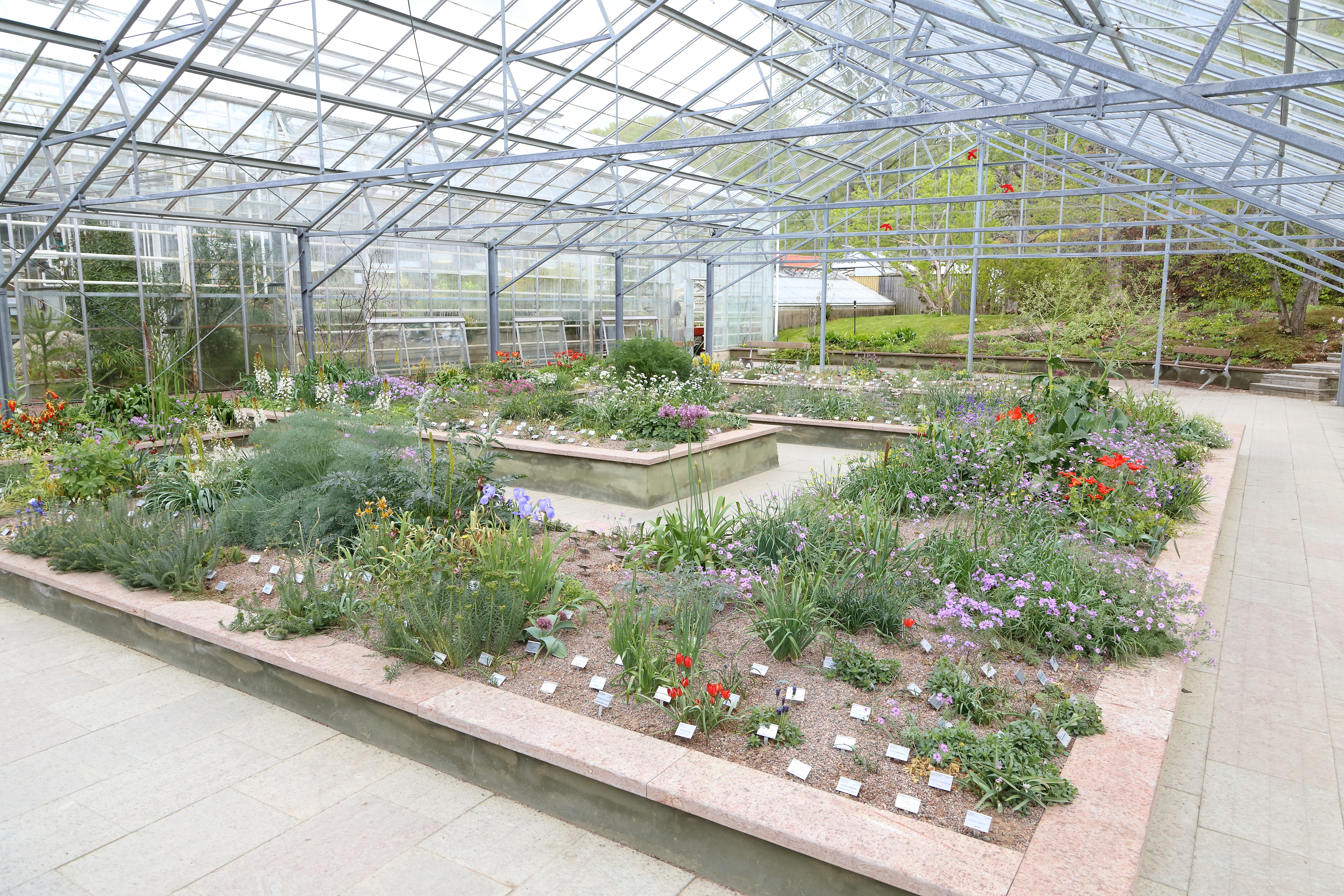 Göteborgs botaniska trädgård.